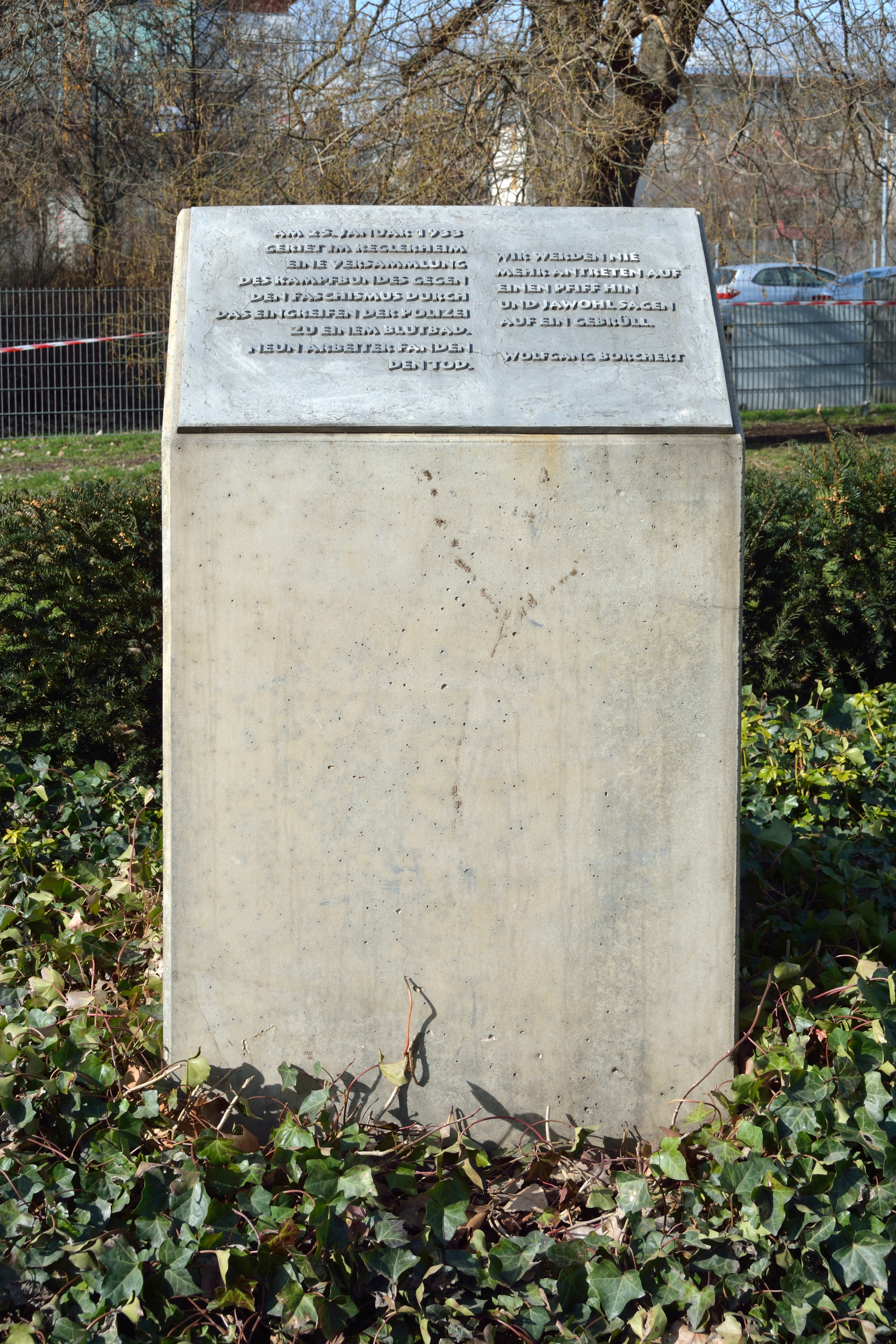 Am 25. Januar 1933, fünf Tage vor der Machtergreifung Adolf Hitlers, wurden neun Mitglieder des "Kampfbundes gegen den Faschismus" von der Polizei getötet. Ihre Namen: Fritz Domaschke Walter Liebscher Paul Eichhorn Paul Maiwald Kurt Förster Richard Michel Kurt Göbel Adolf Sommerfeld Herrmann Koch Quelle: [1]